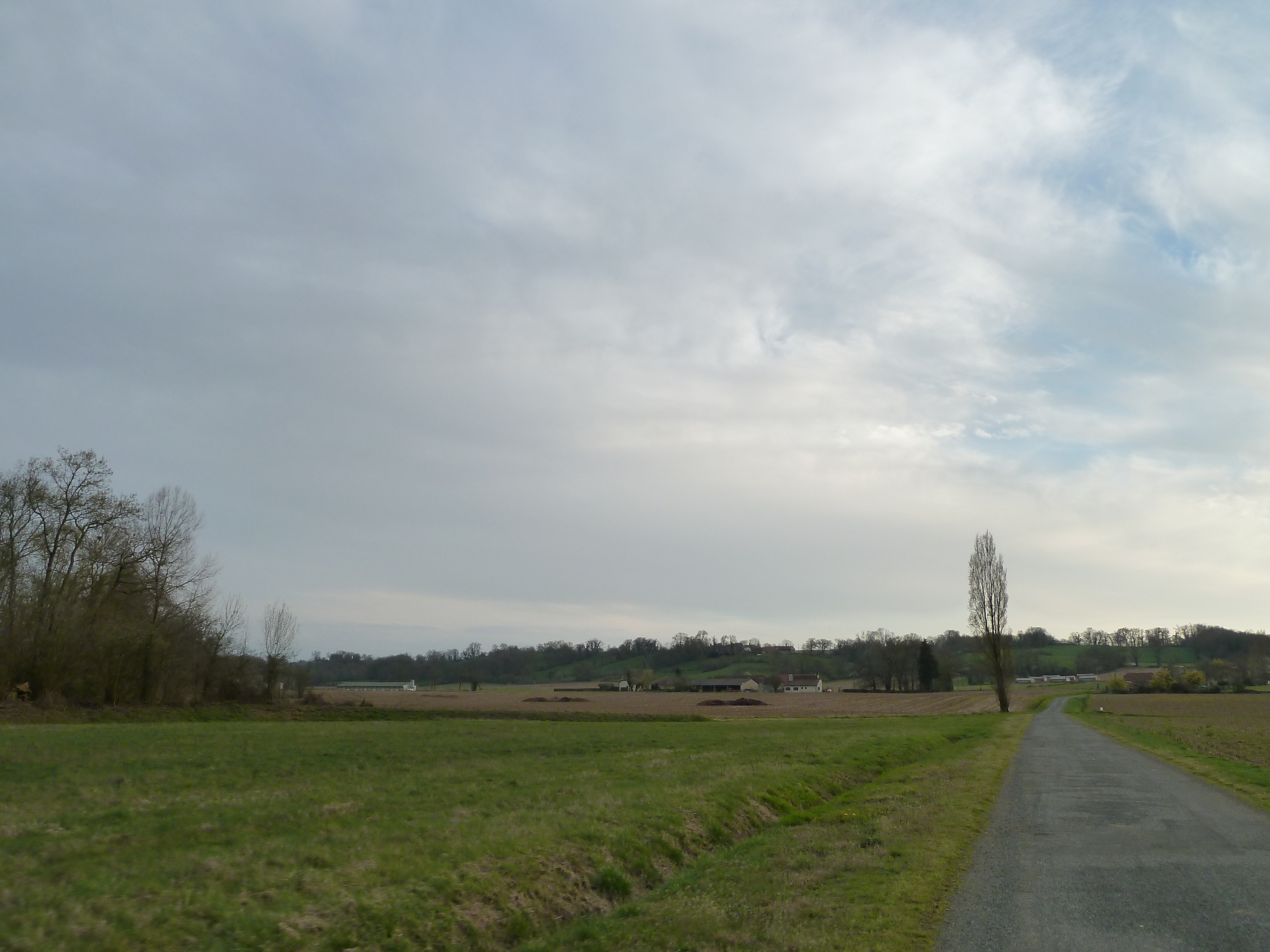 Mondebat